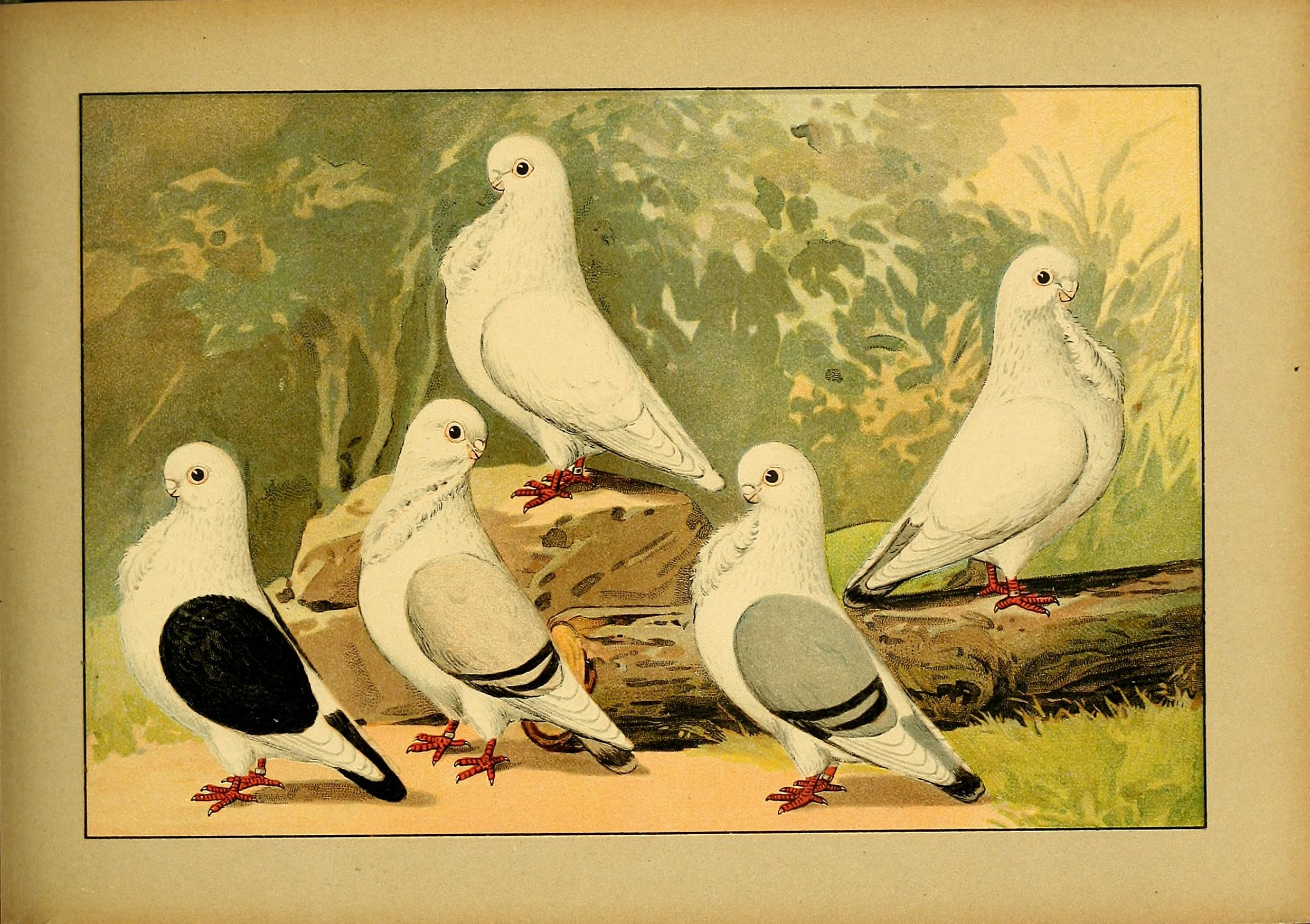 Deutsch